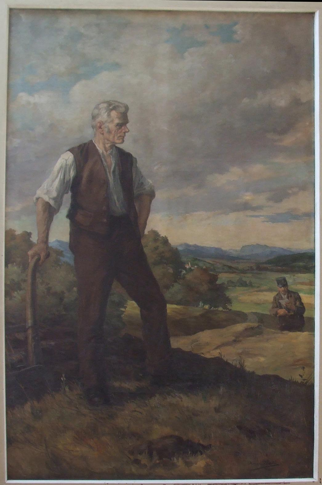 Jodok Fink, Gemälde im Andelsbucher Rathaus